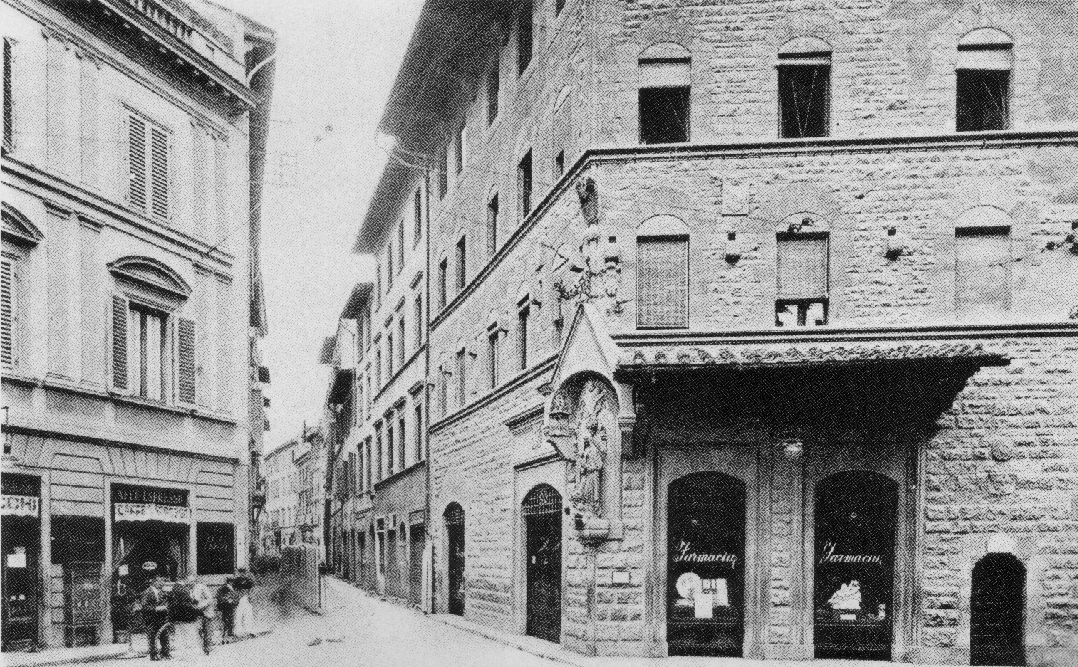 Firenze, canto alle rondini negli anni